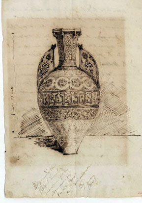 Croquis a la tinta sobre papel realizado por Mariano Fortuny del Vaso de Fortuny, pieza de su colección conservada en el Museo del Ermitage (San Petersburgo). Dibujo conservado en el Museo Nacional de Arte de Cataluña. Barcelona